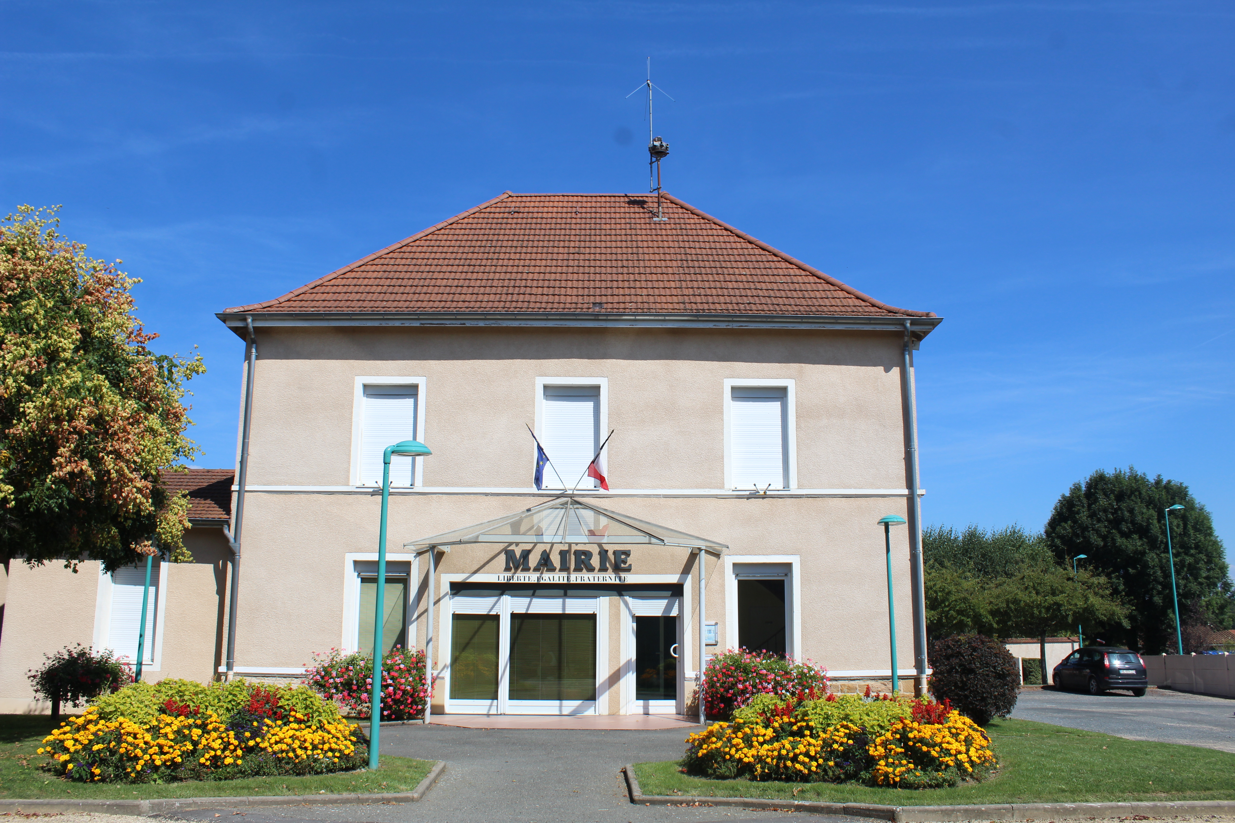 Mairie de la commune de L'Abergement-Clémenciat.